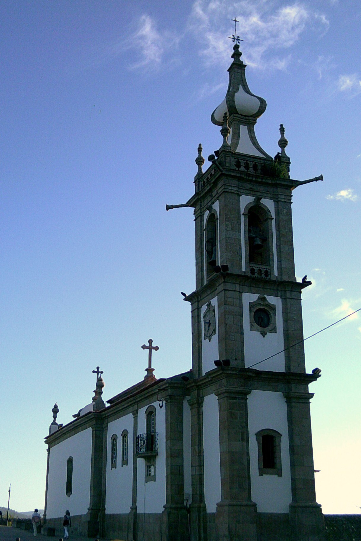 Igreja de Santo António da Torre Velha, freguesia, cidade e concelho de Ponte de Lima, concelho de Viana do Castelo, Portugal.